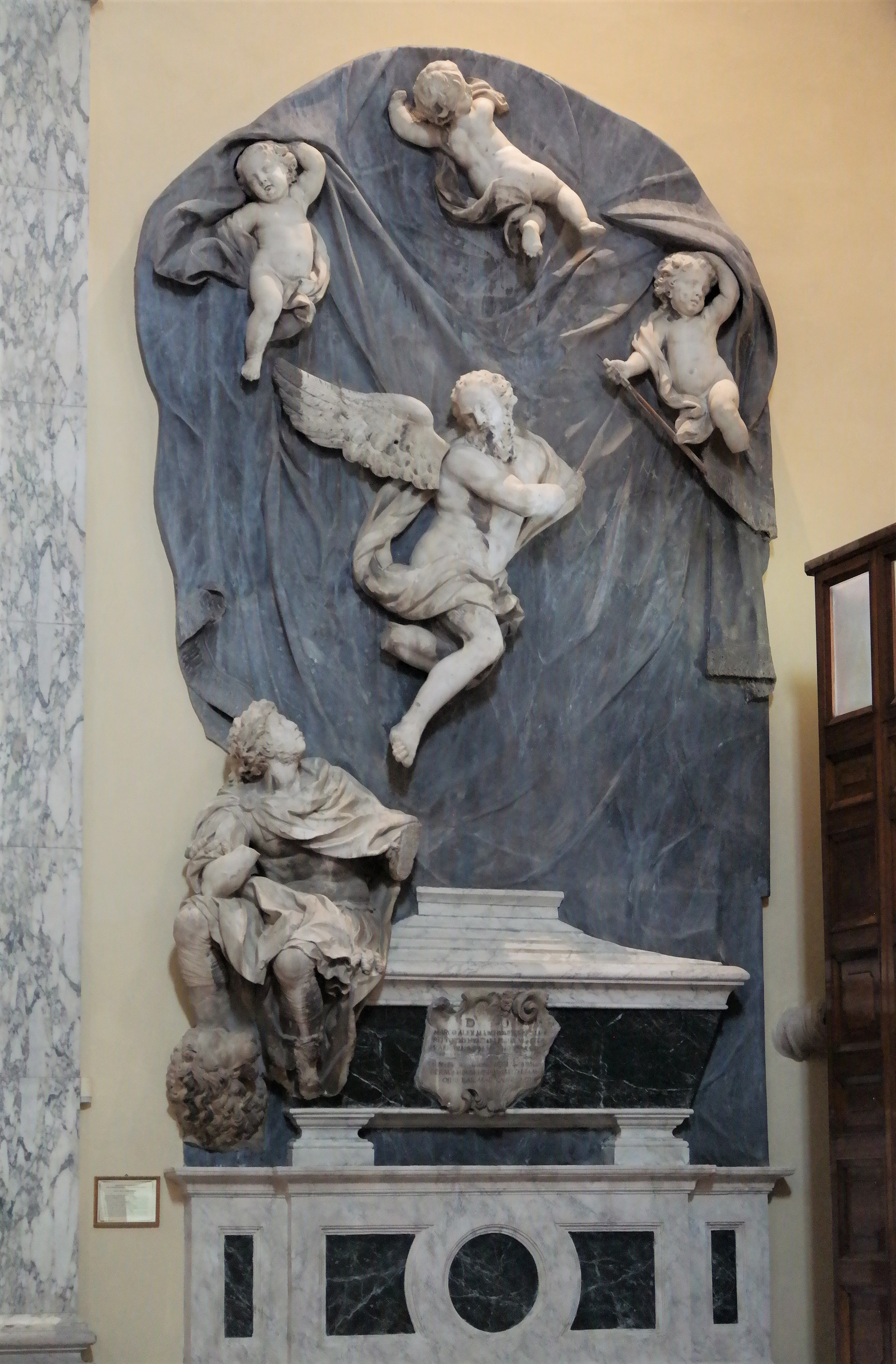 Monumento sepolcrale a Marco Alessandro dal Borro di Giovan Battista Foggini nel Duomo di Livorno.